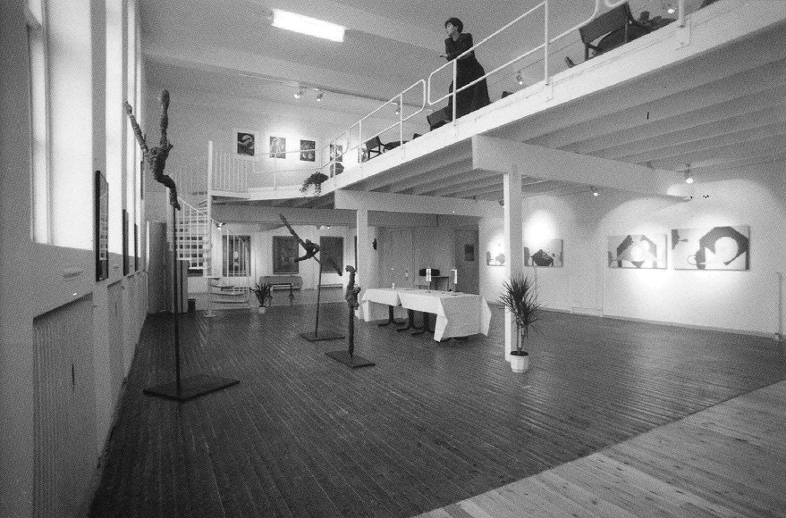 Utstillingshallen